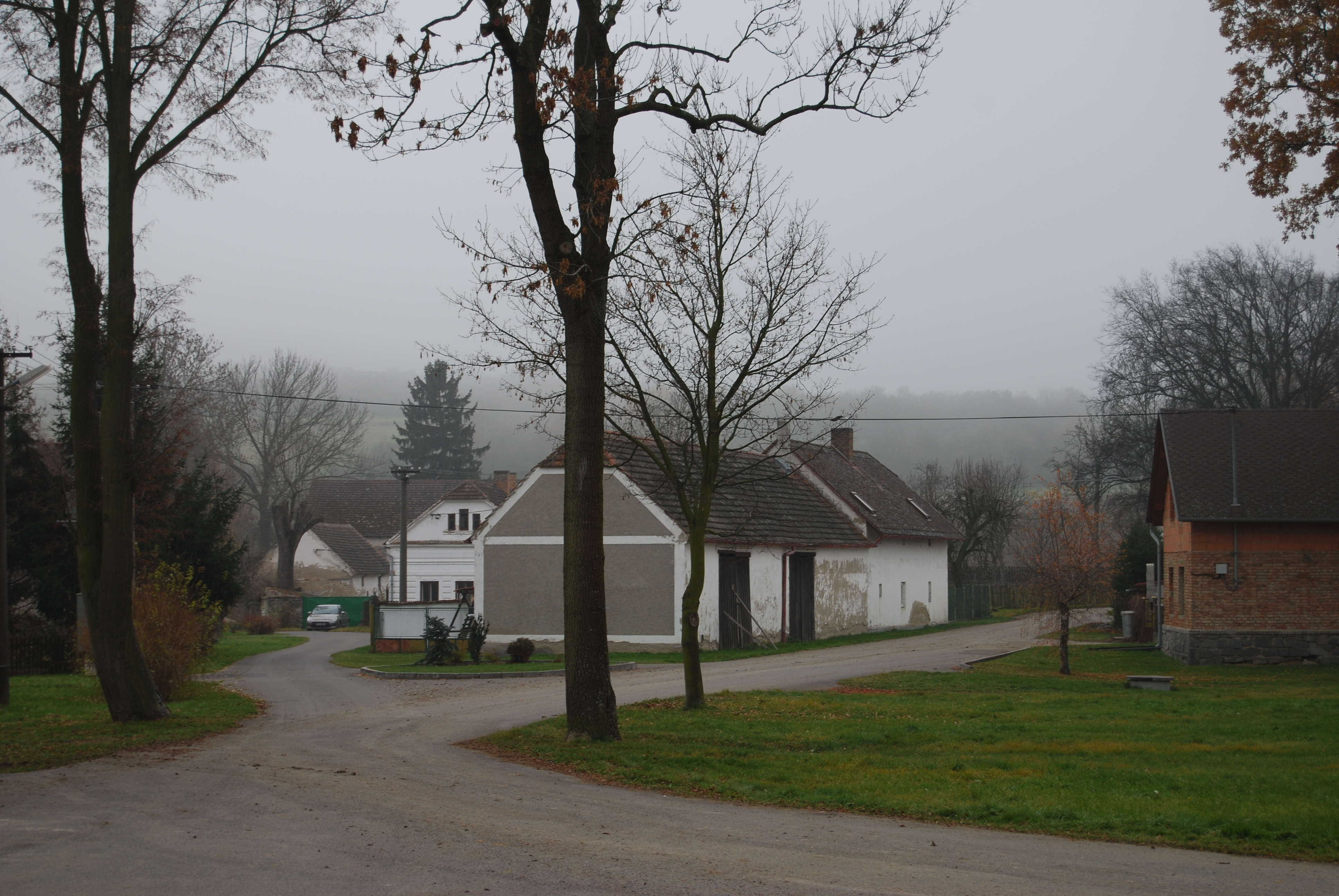 Pohled na část obce. Svučice je část obce Mišovice v okrese Písek. Česká republika.